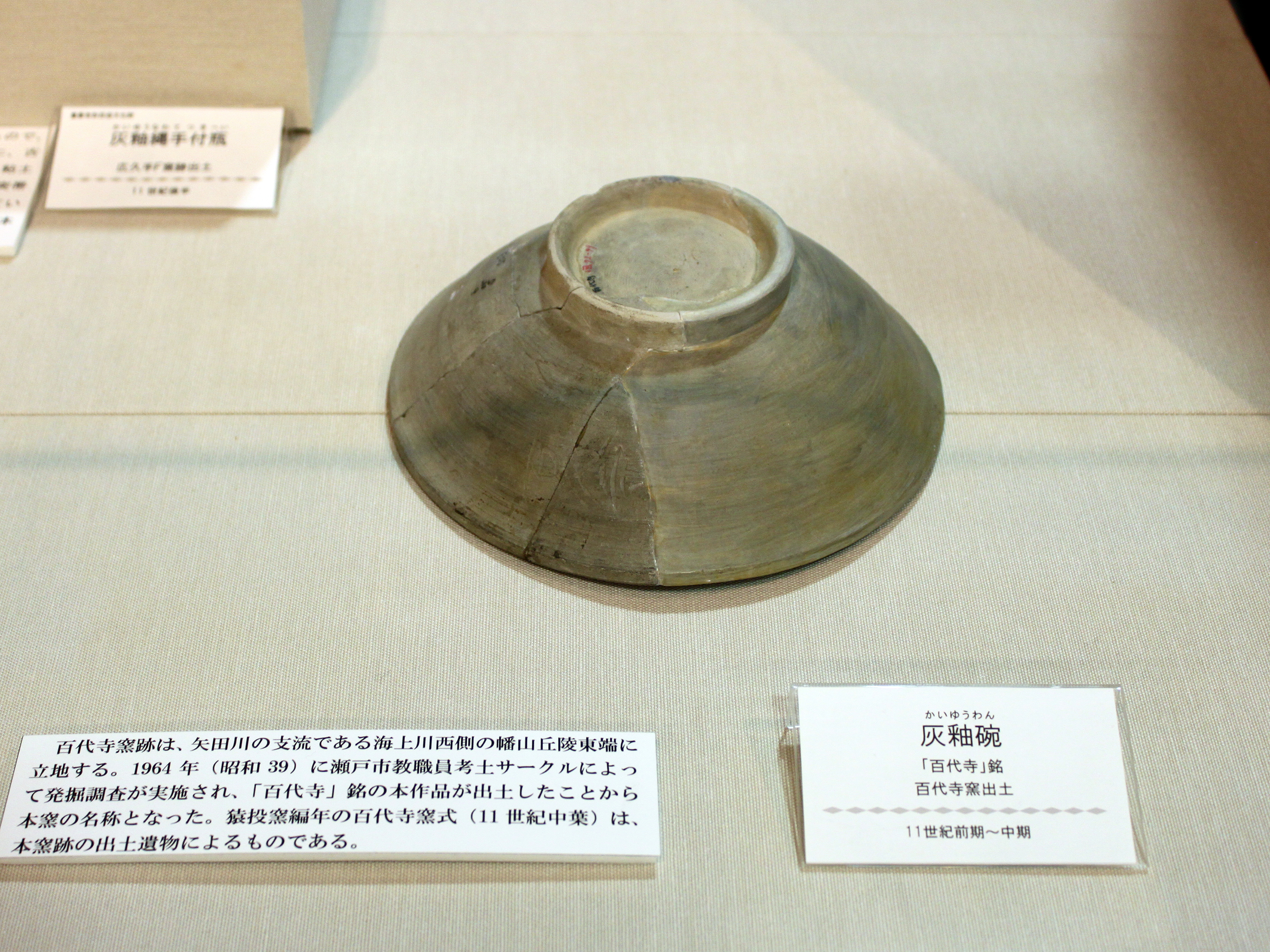 瀬戸窯産の灰釉陶器の碗